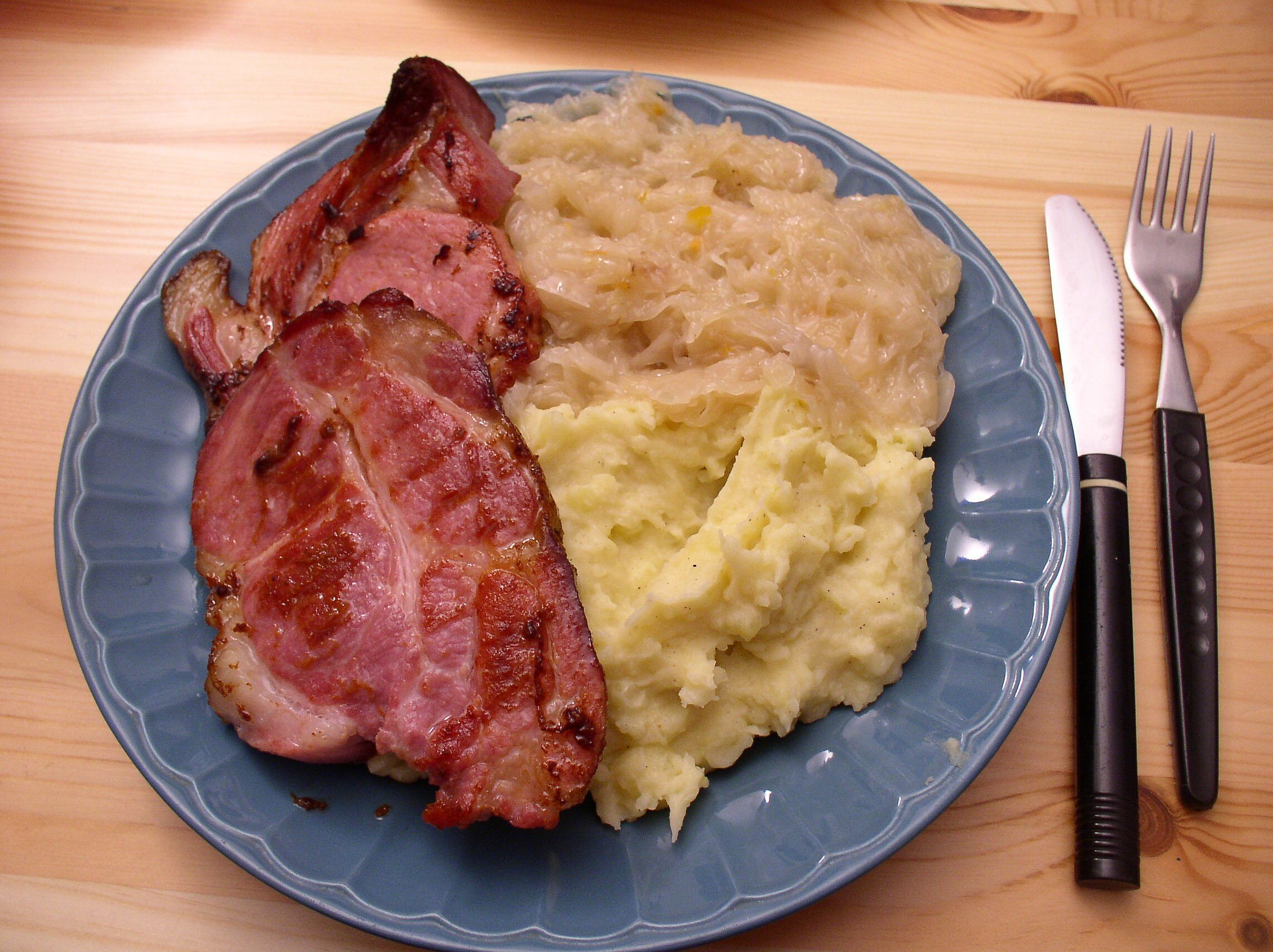 Kassler gebraten mit Sauerkraut und Kartoffelpuree, a typical dish from Berlin dies ist sehr typisch für die berlinerküche diese gilt seit 1877